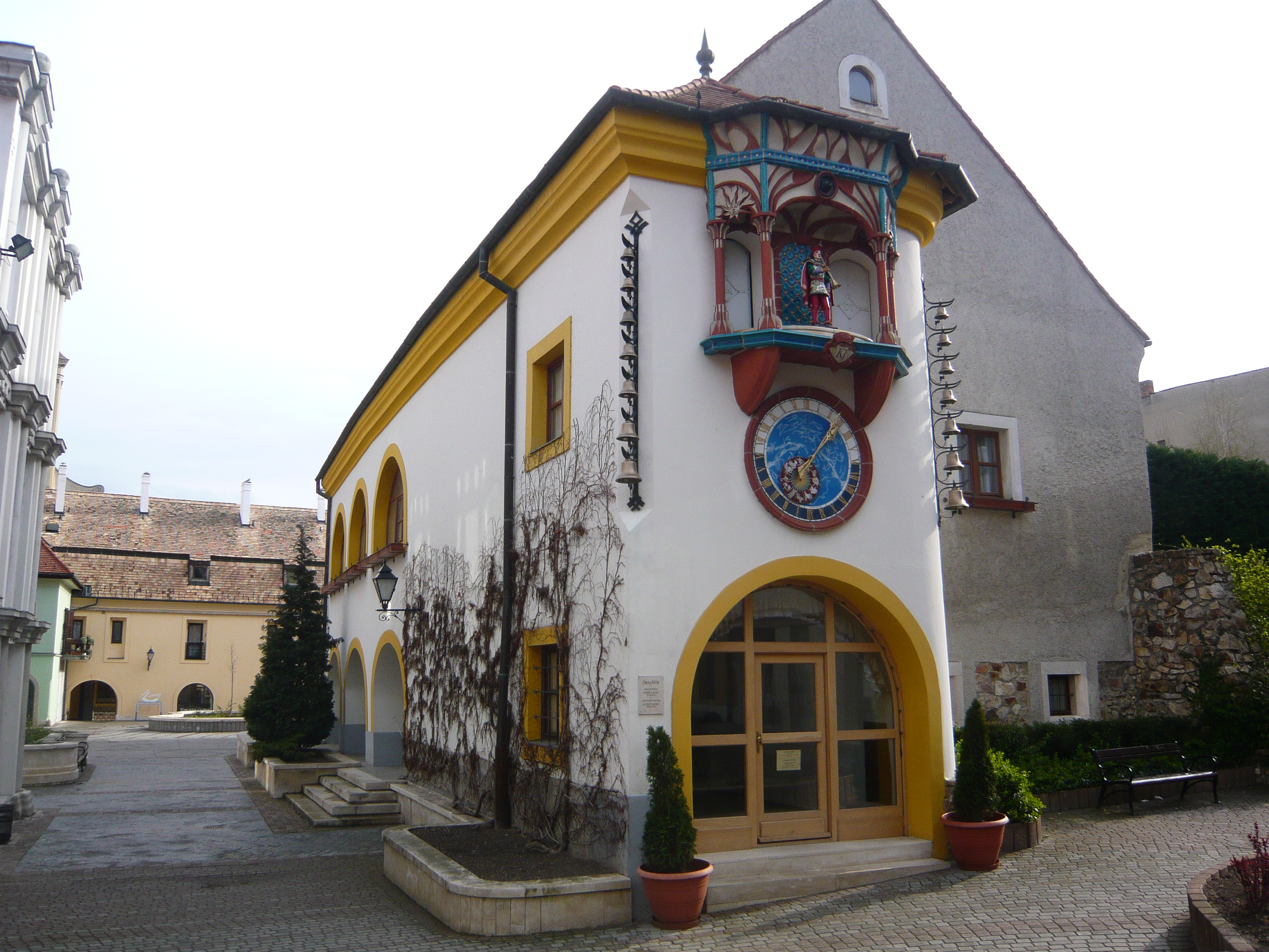 からくり時計,Székesfehérvár,Hungary（セーケシュフェヘールヴァール,ハンガリー）でHide-spが撮影。